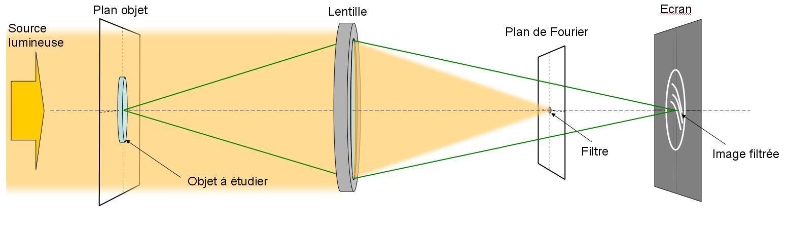 Schéma personnel du montage de strioscopie (Kilohn_Limahn, 17/09/08). Correction du précédent schéma qui conjugait la source, et non l'objet, Ã l'image.